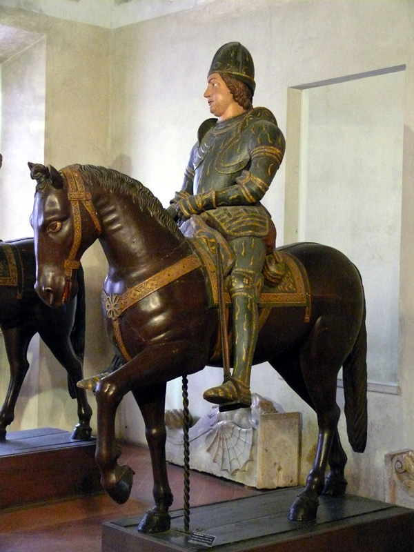 Rodomonte Gonzaga - statua lignea - Sabbioneta